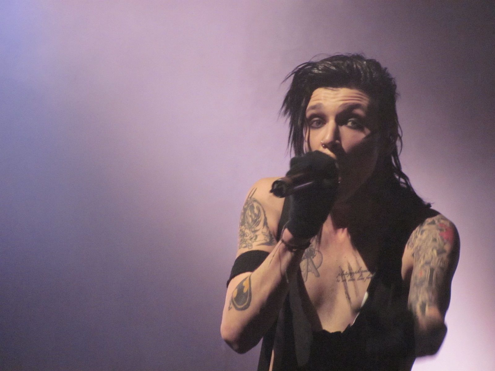 Concierto de la banda Black Veil Brides el 25 de enero de 2013 en Nueva York. En la imagen: Andy Biersack.